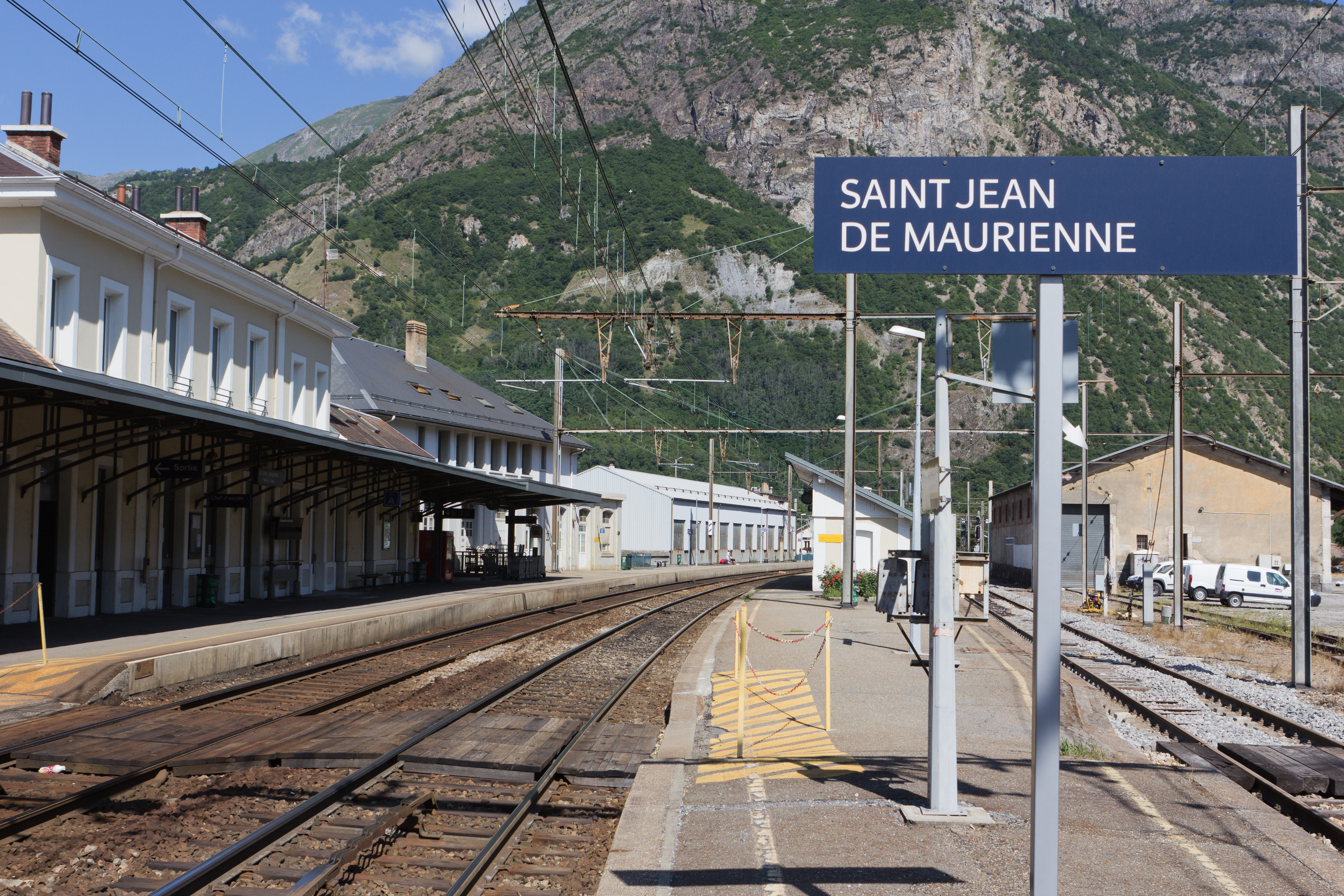 Gare de Saint-Jean de Maurienne, commune de Saint-Jean de Maurienne, département de la Savoie, France